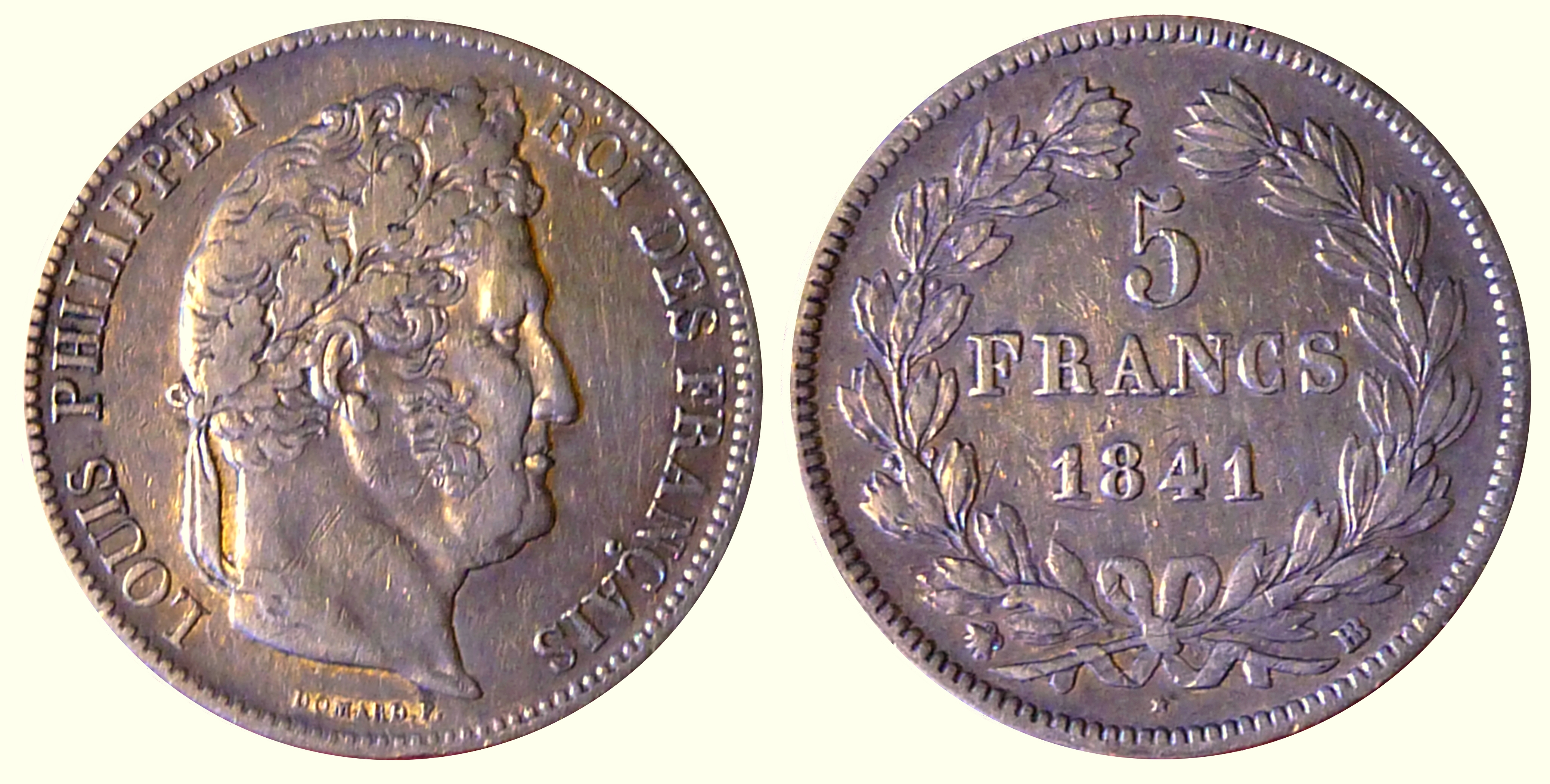 Pièce de 5 francs émise en 1841 à Strasbourg (BB). Frappe 2.082.003 exemplaires. Argent, 0,900%, diamèrtre 27 mm, poids 25 gr. Tranche en relief « Dieu protège La France ». Collection personnelle.